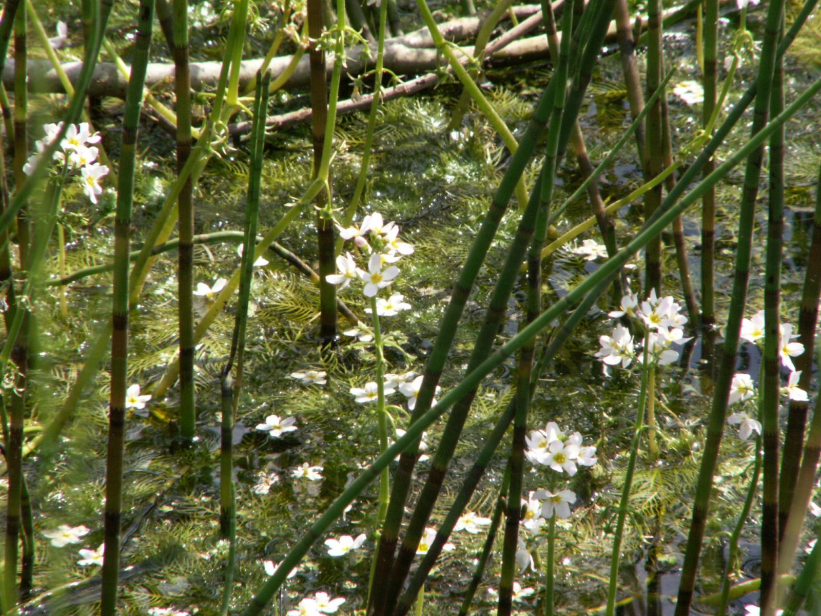 Hottonia palustris and Equisetum hyemale